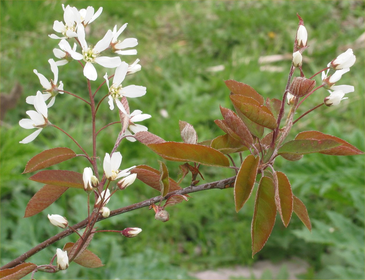 Amelanchier lamarckii leaves